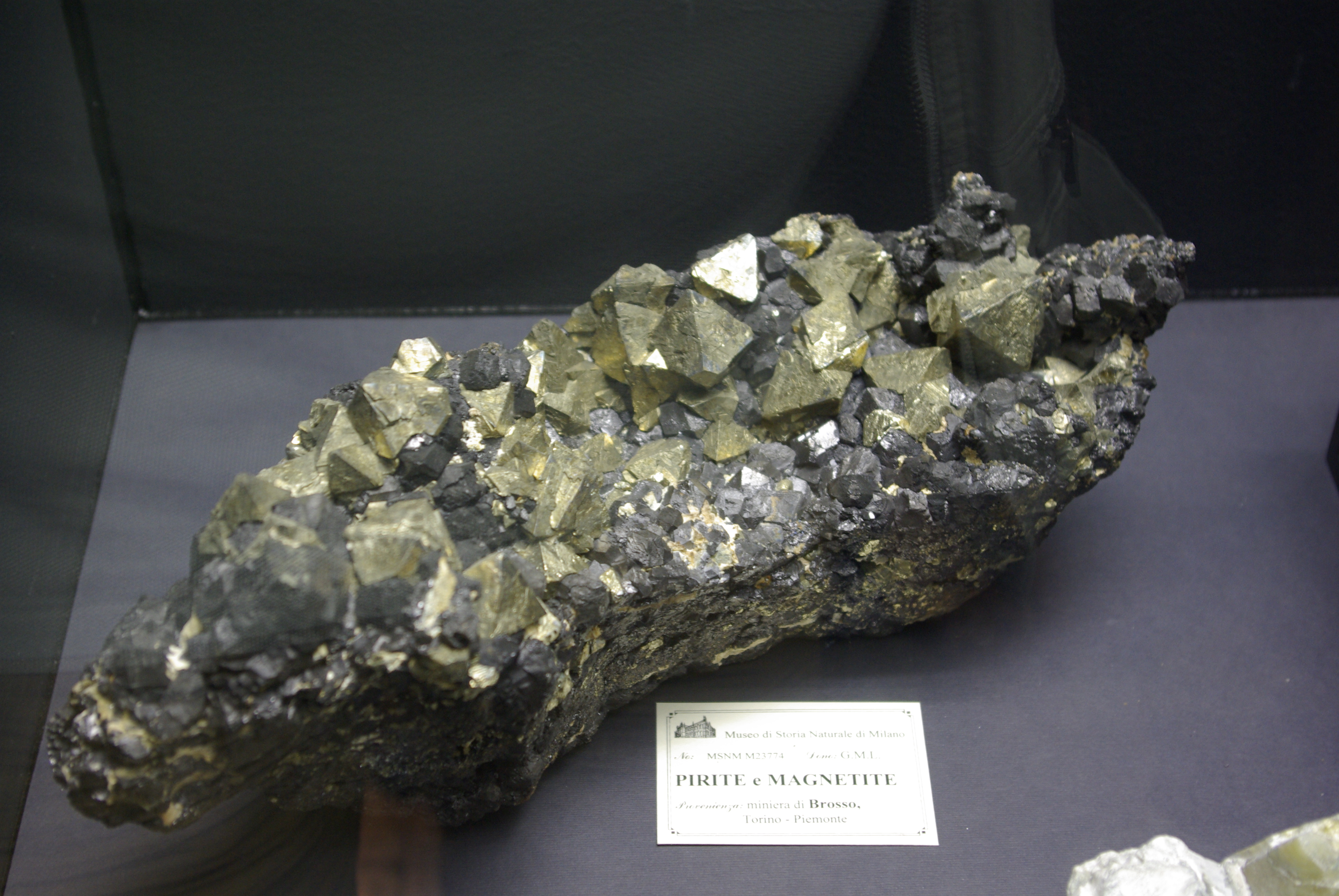 Museo civico di storia naturale This is a photo of a monument which is part of cultural heritage of Italy.